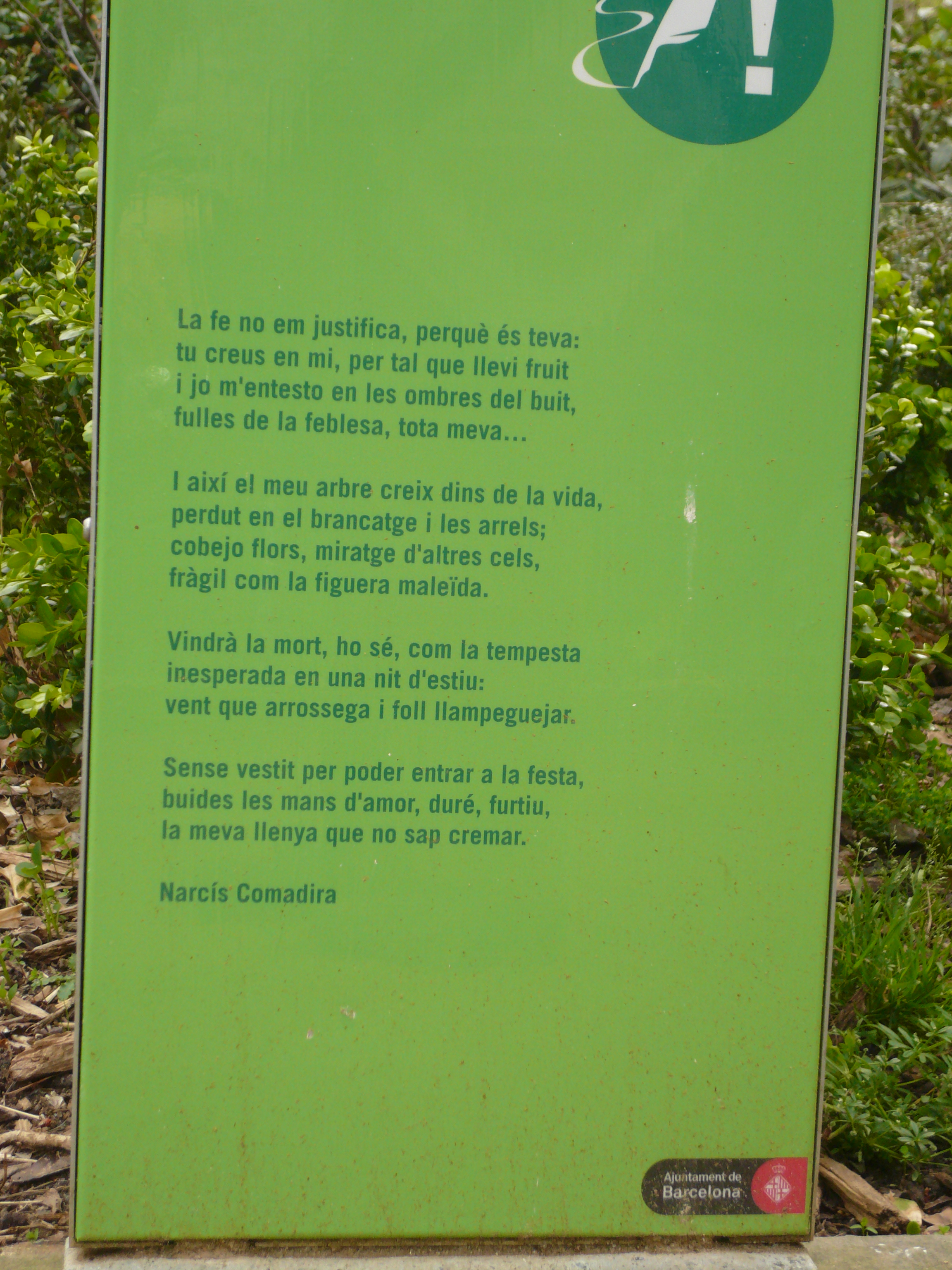 Itineraris poètics al Turó Parc.